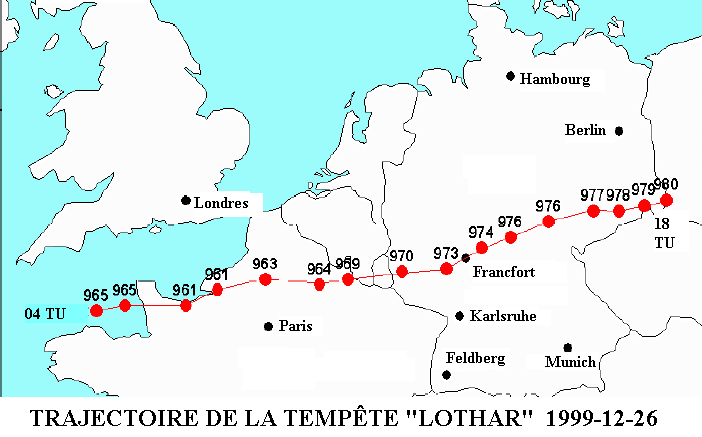 Trajectoire de la qui est passée le 26 décembre 1999 sur le nord de la France en direction de l'Allemagne.